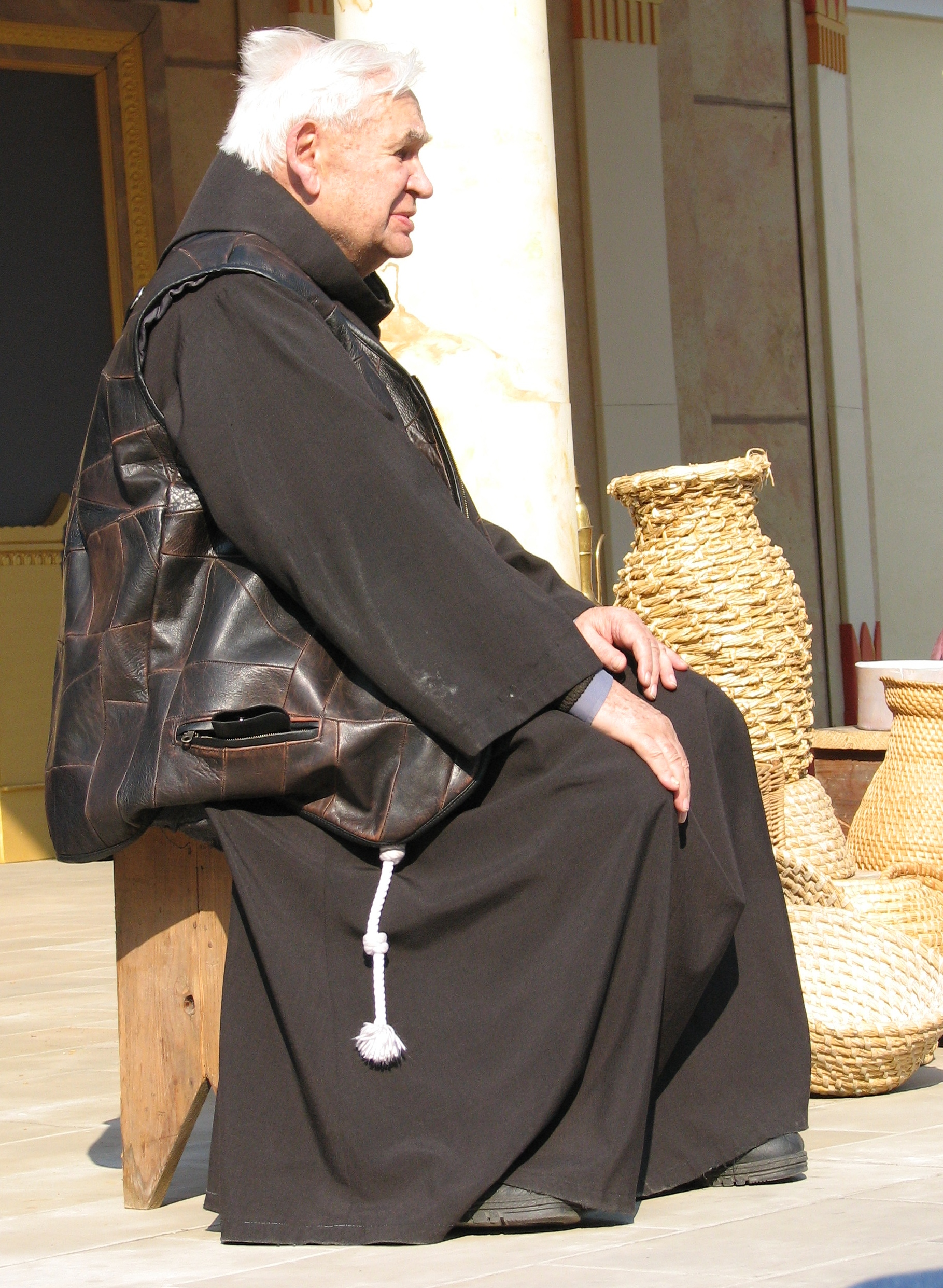 O. Augustyn Chadam podczas Misteriów Męki Pańskiej 2007